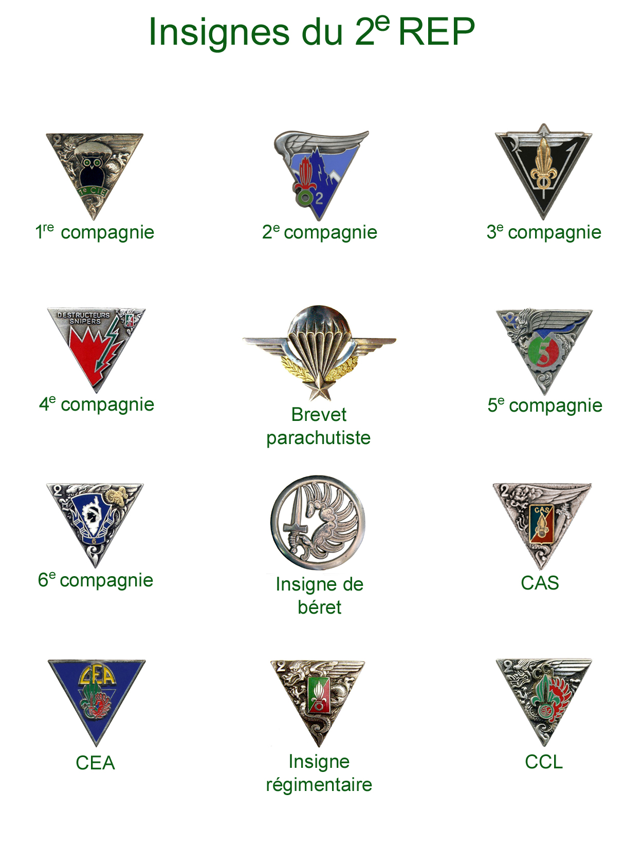 Planches d'insignes des unités du 2e régiment étranger de parachutistes.